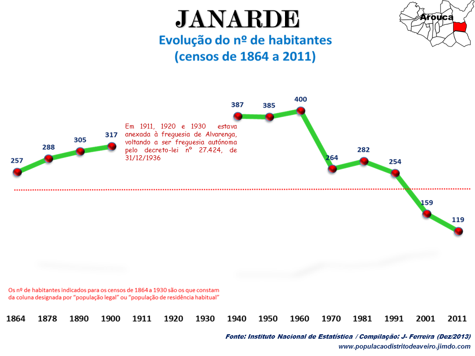 Evolução da População 1864 / 2011